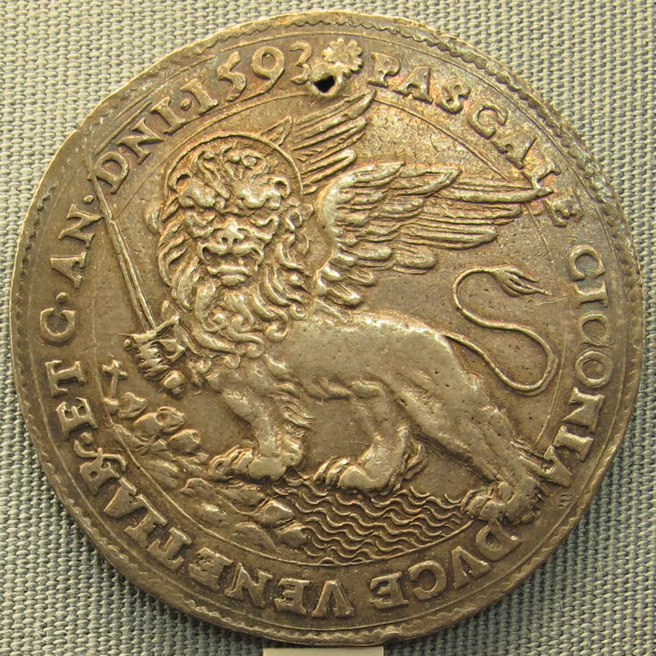 Venezia, scudo di pasquale cicogna, 1593